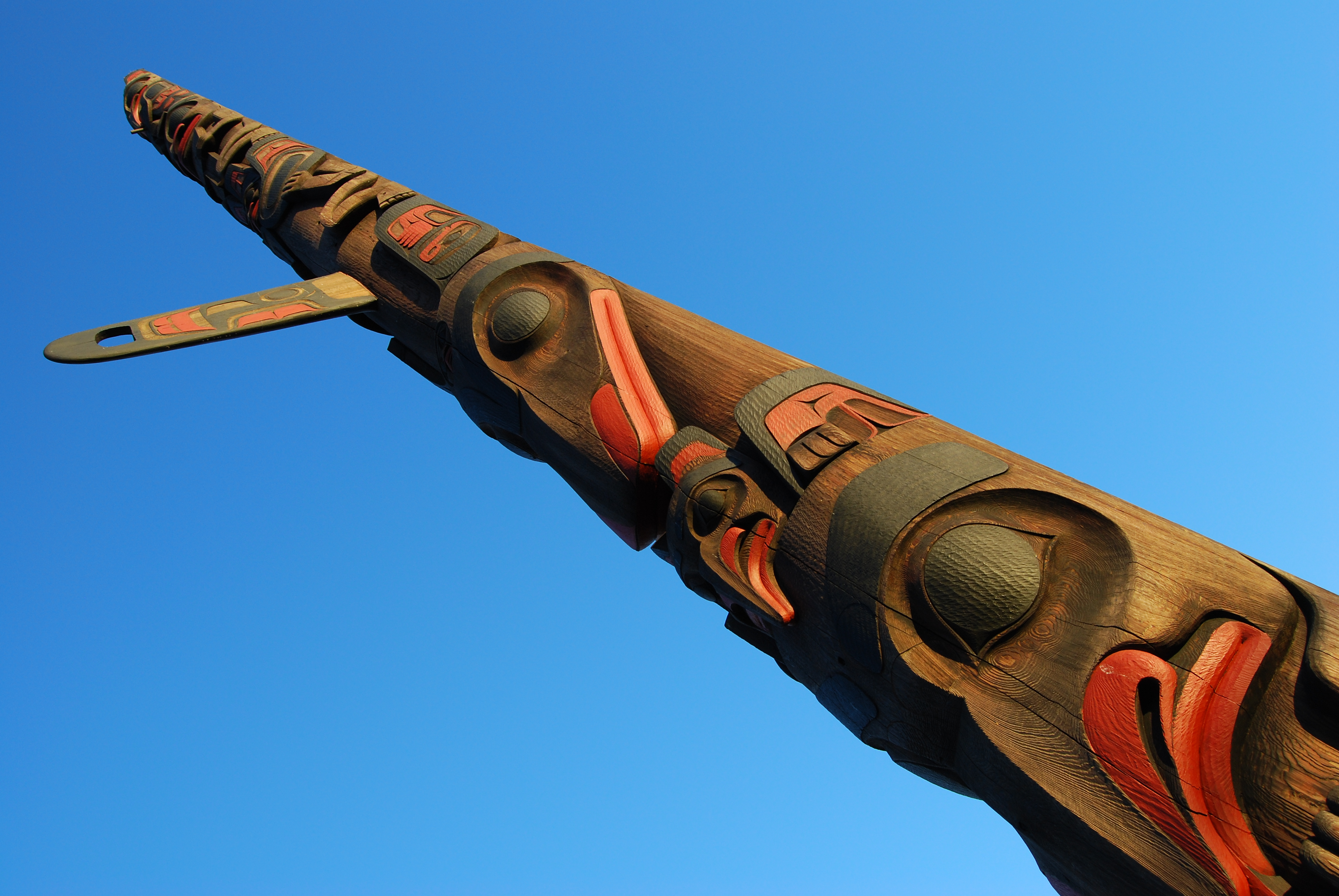 Standing